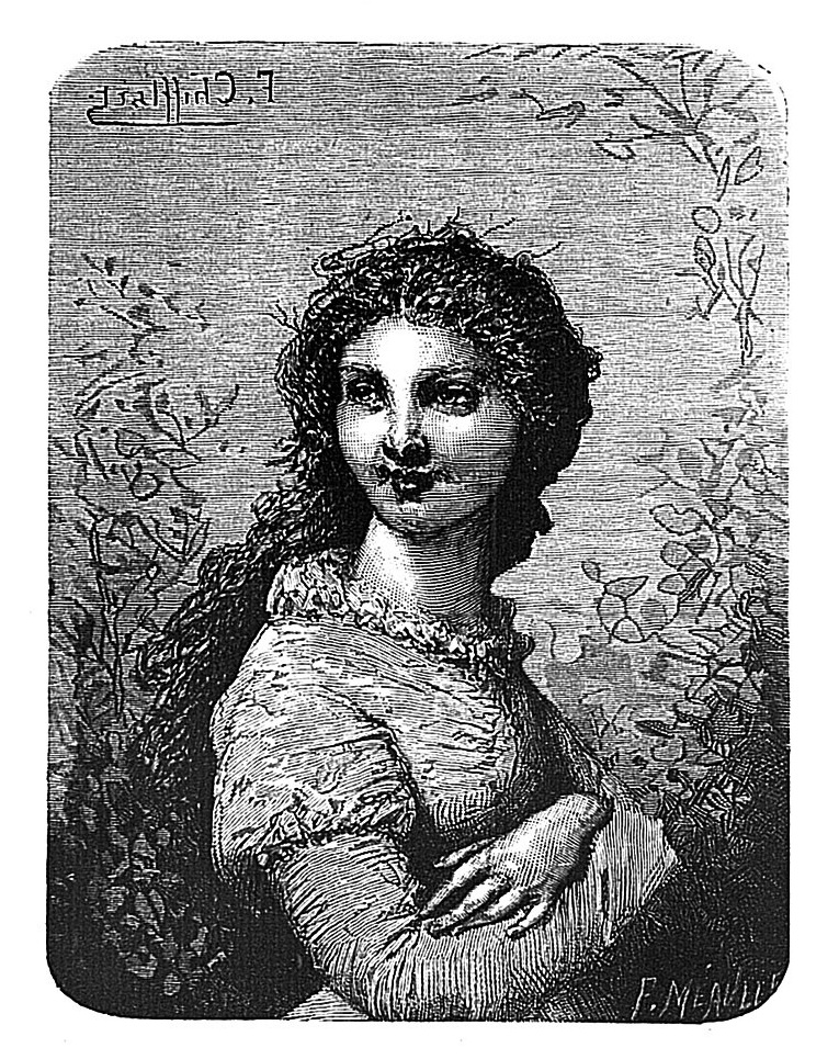 Déruchette, illustration pour Les Travailleurs de la mer — Éditions E. Hugues 1883 (Paris)